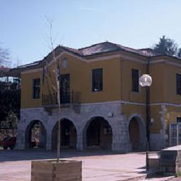 Ayuntamiento de Caso